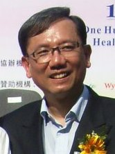 勞永樂 傳染病科醫生，香港醫學博物館董事，香港傳染病學會會董。